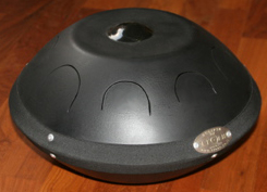 Uno steel tongue drum modello Eclipse, della 1Tone.